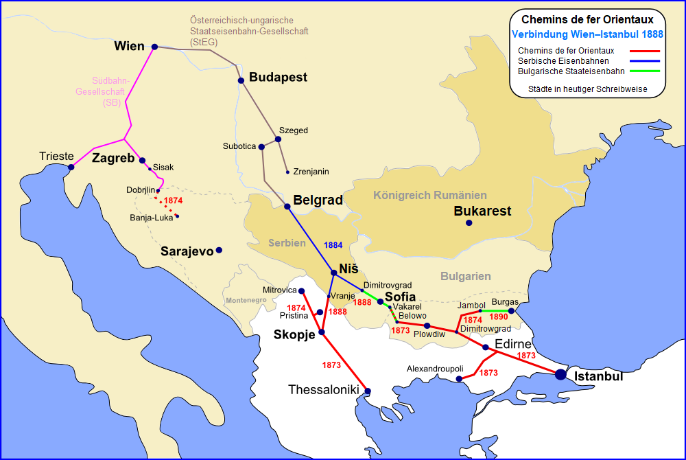 Chemins de fer Orientaux (Orientbahn): Die Bahnverbindung von Istanbul nach Wien wurde im Jahr 1888 fertiggestellt.